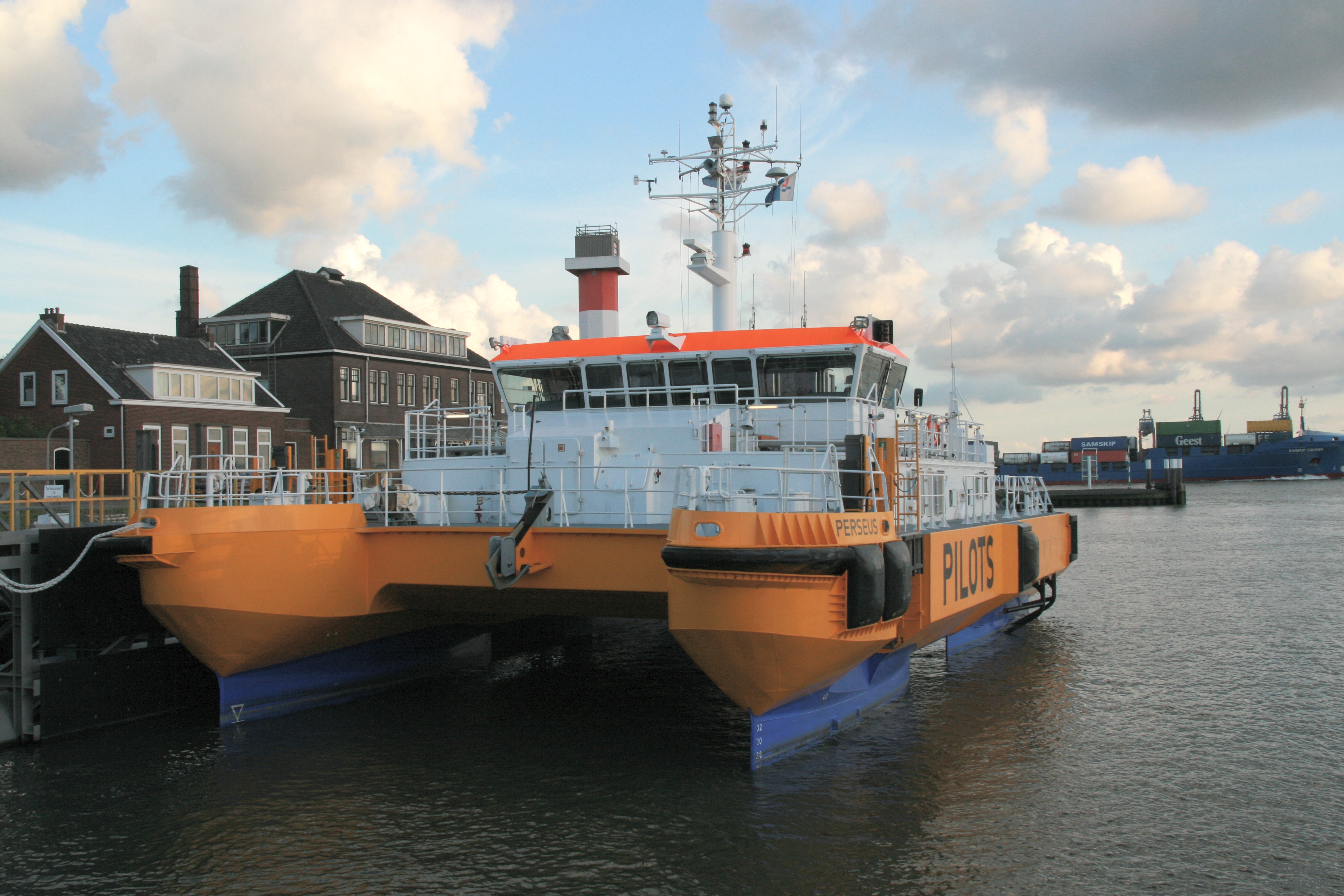 SWATH Perseus in Hoek van Holland IMO Number: 9367114 MMSI Number: 246390000 Callsign: PHDI Length: Beam